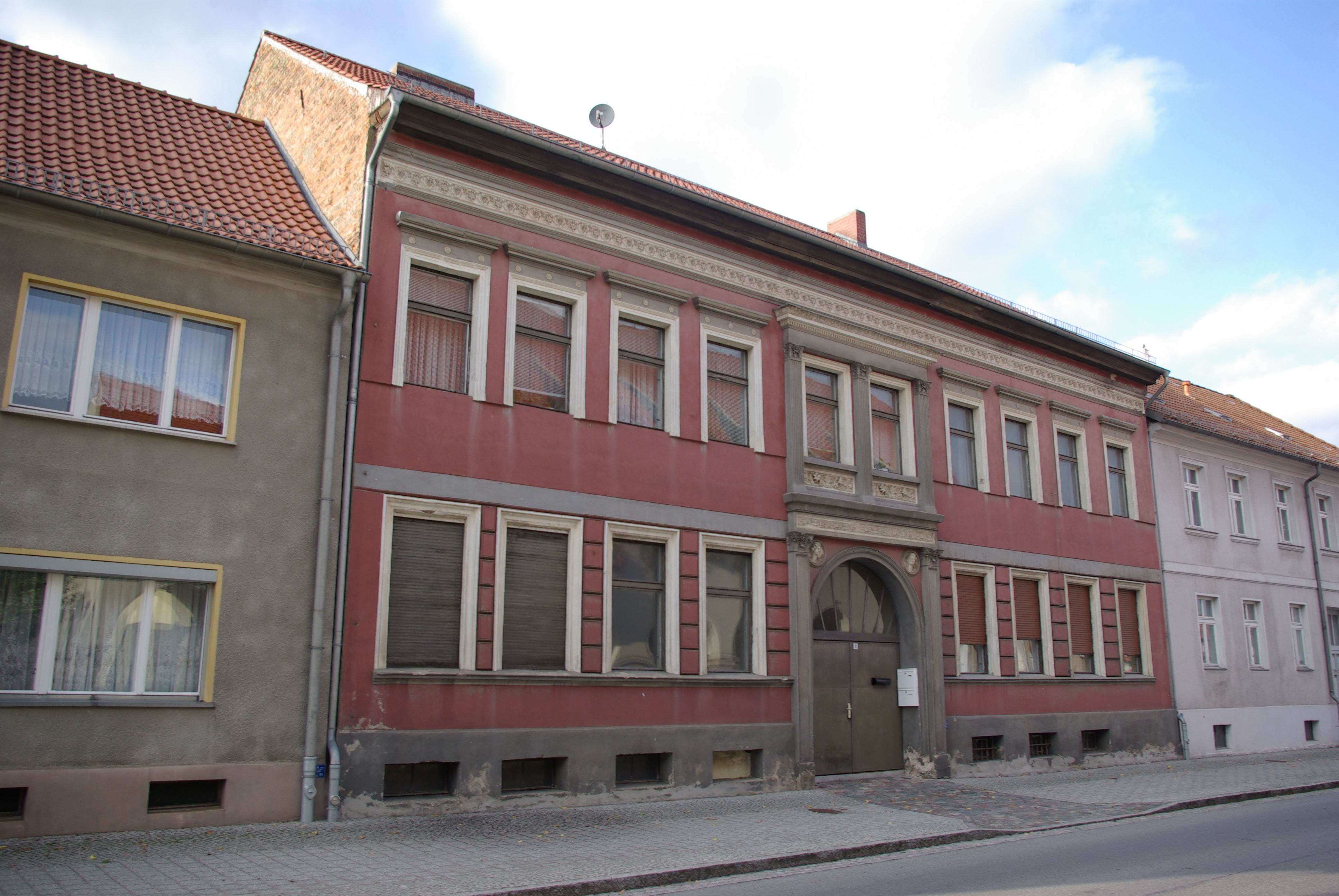 Trebbin in Brandenburg. Das Haus in der Luckenwalder Straße 2 steht unter Denkmalschutz. Es steht direkt gegenüber der Kirche.